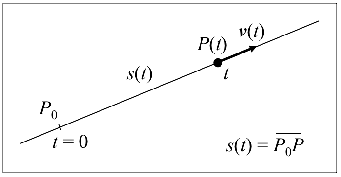 Higidura zuzenaren konteptu eta magnituden adierazpen grafikoa